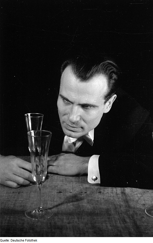 Original image description from the Deutsche Fotothek Szenenbilder